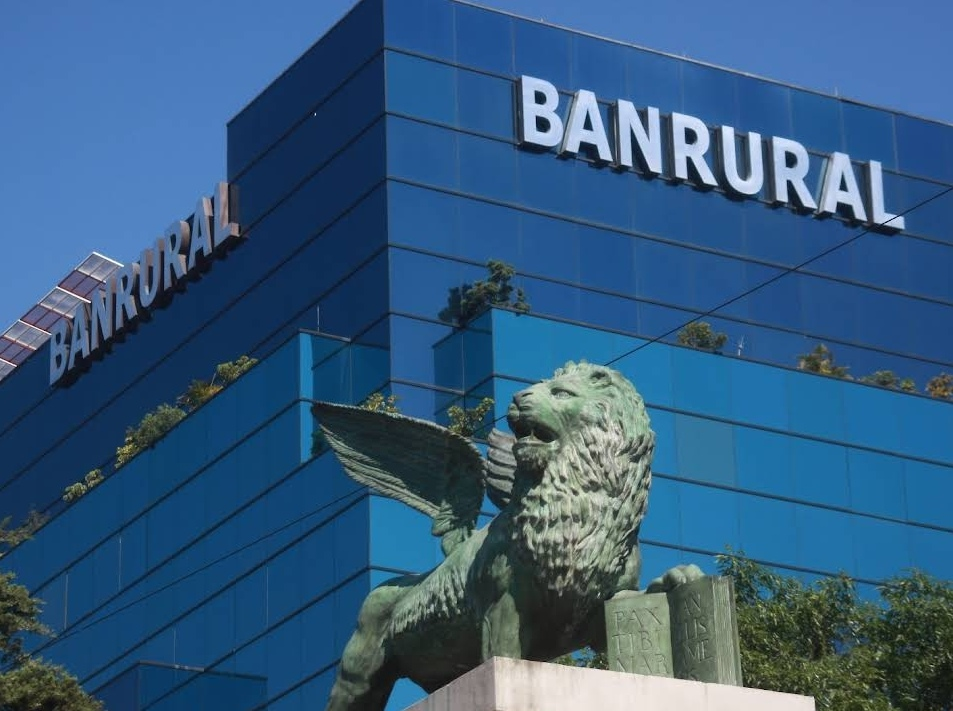 banrural Guatemala zona 9 banco